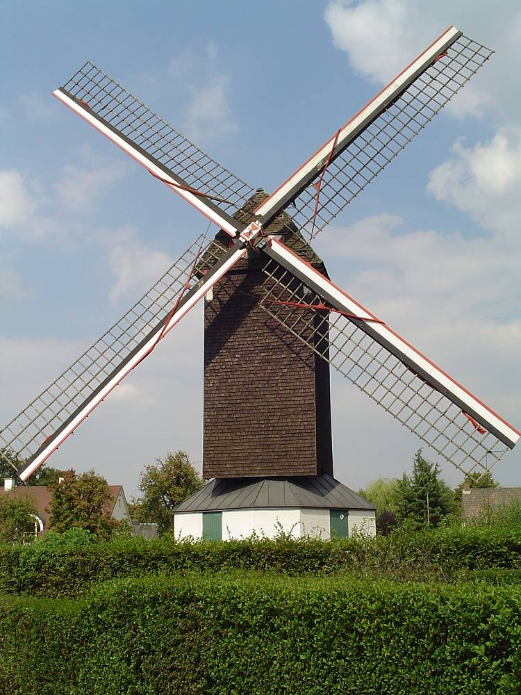 De Latemse Windmolen